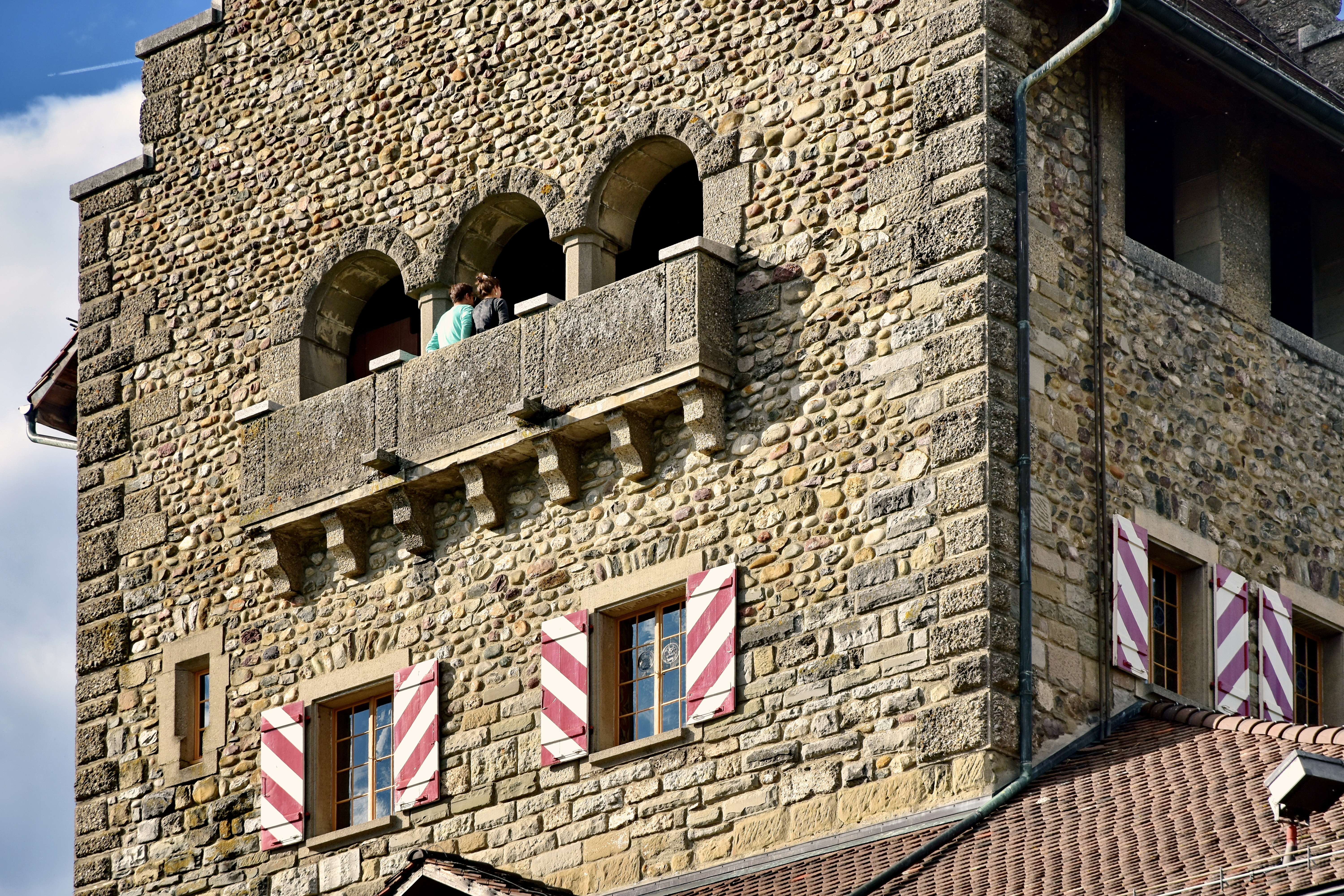 Schloss (Castle) in Uster (Switzerland)